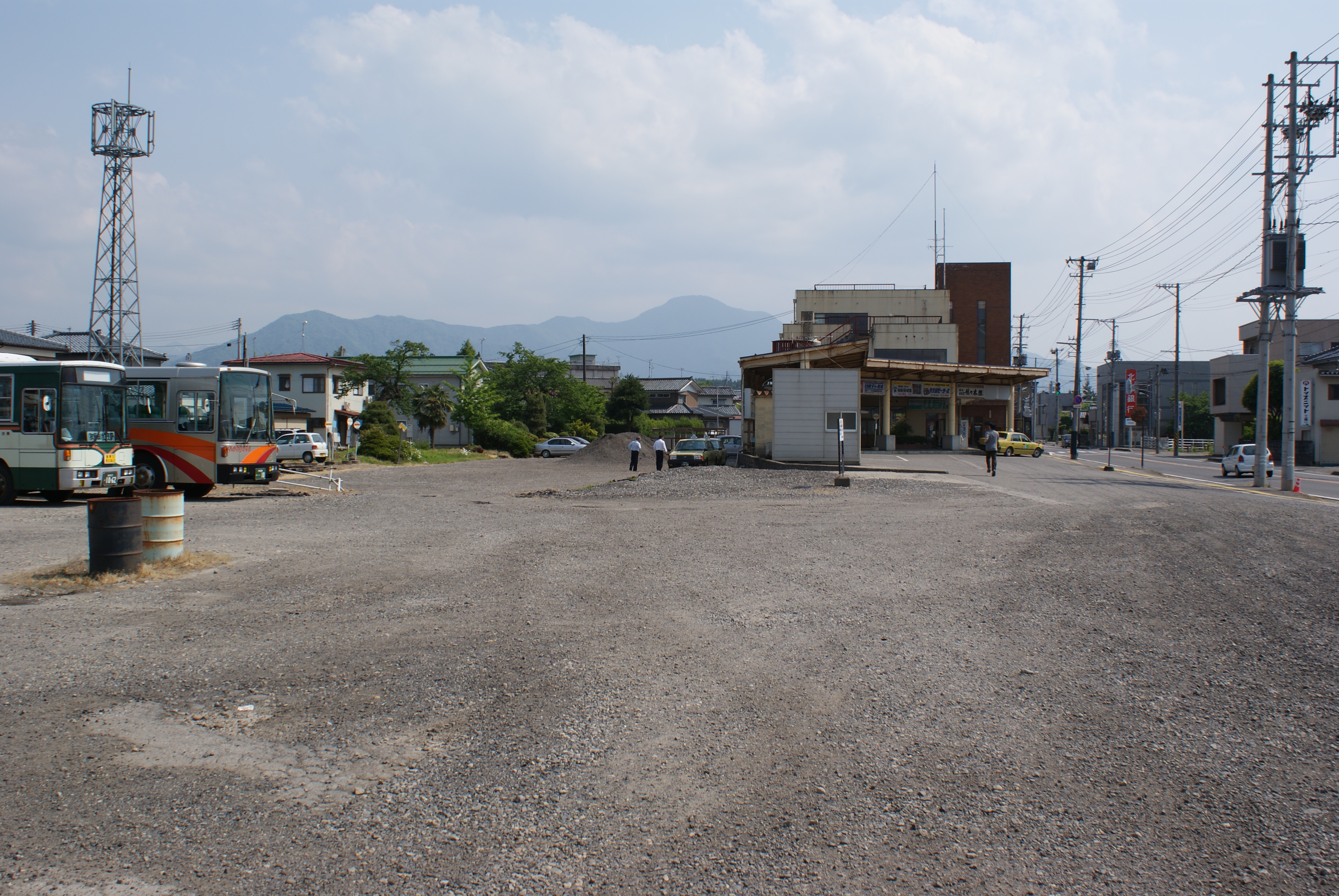 旧蒲原鉄道村松駅跡。